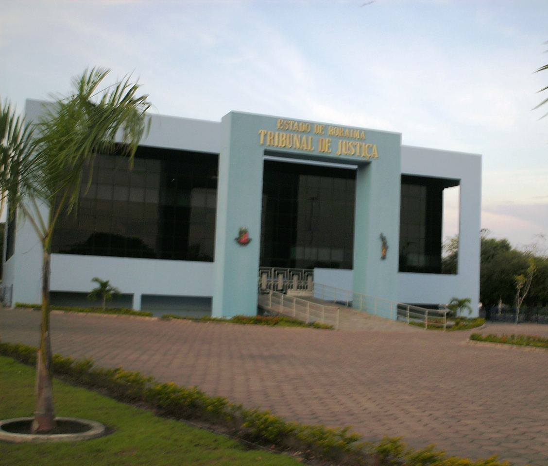 Tribunal de Justiça de Boa Vista